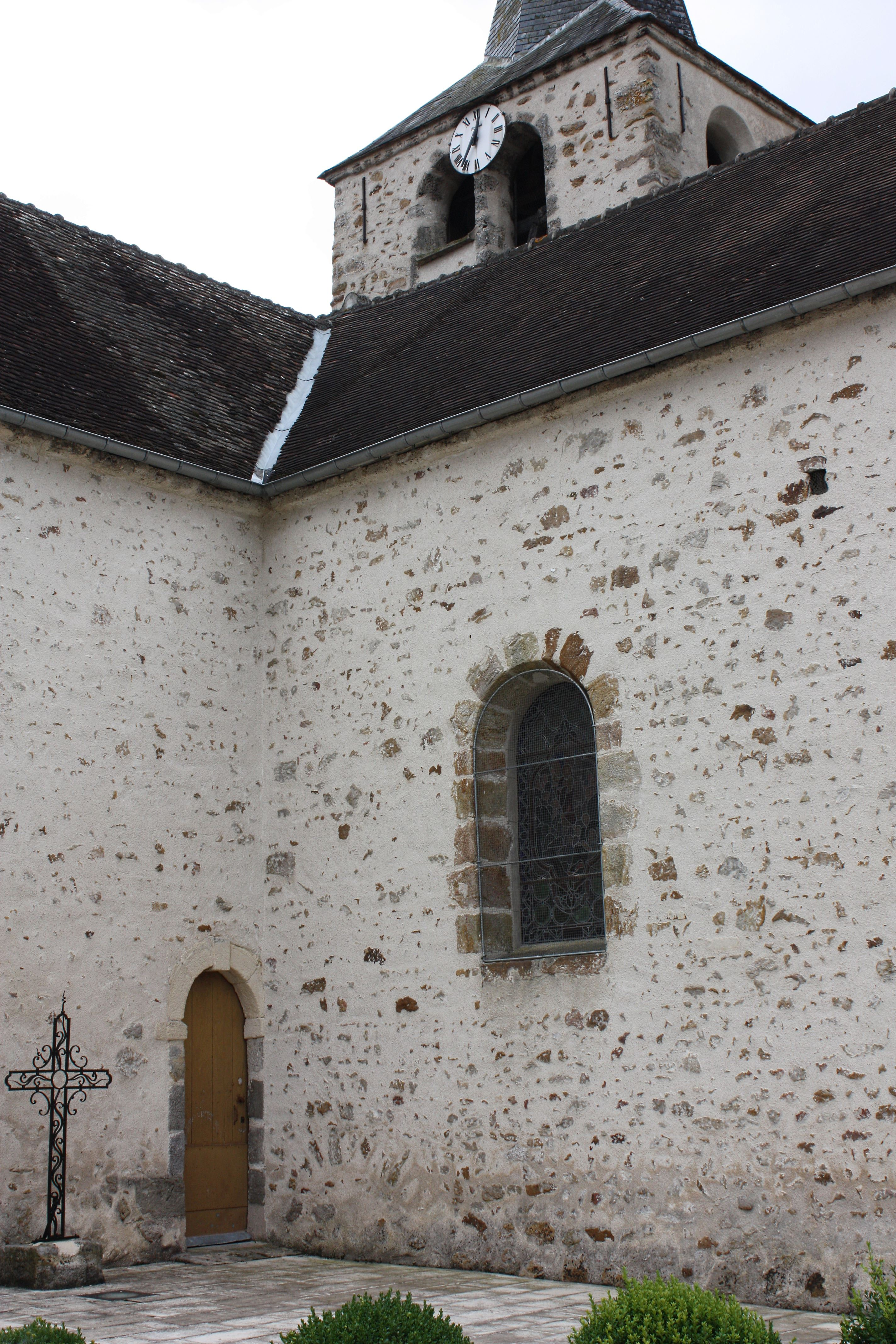 Crancey - Eglise Saint-Loup-de-Troyes